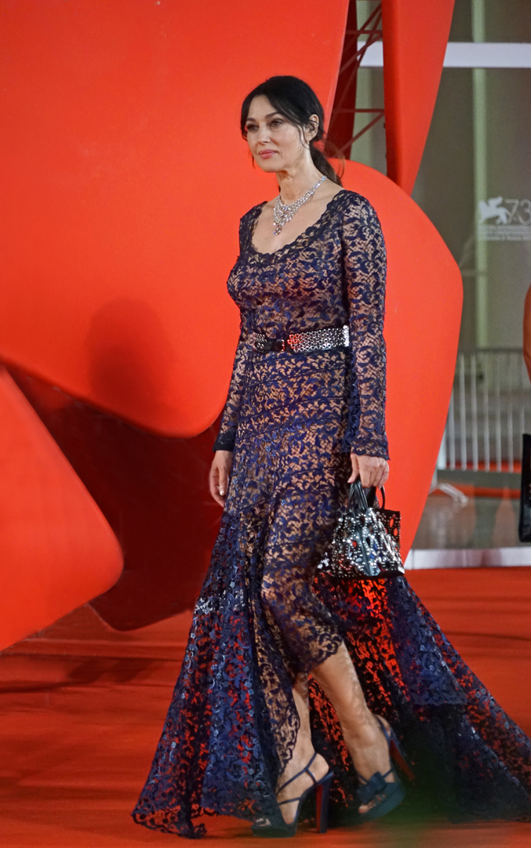 Arrivée de Monica Bellucci avec Emir Kusturica à la Mostra del Cinema au Lido de Venise pour la projection du film "On the milky road"